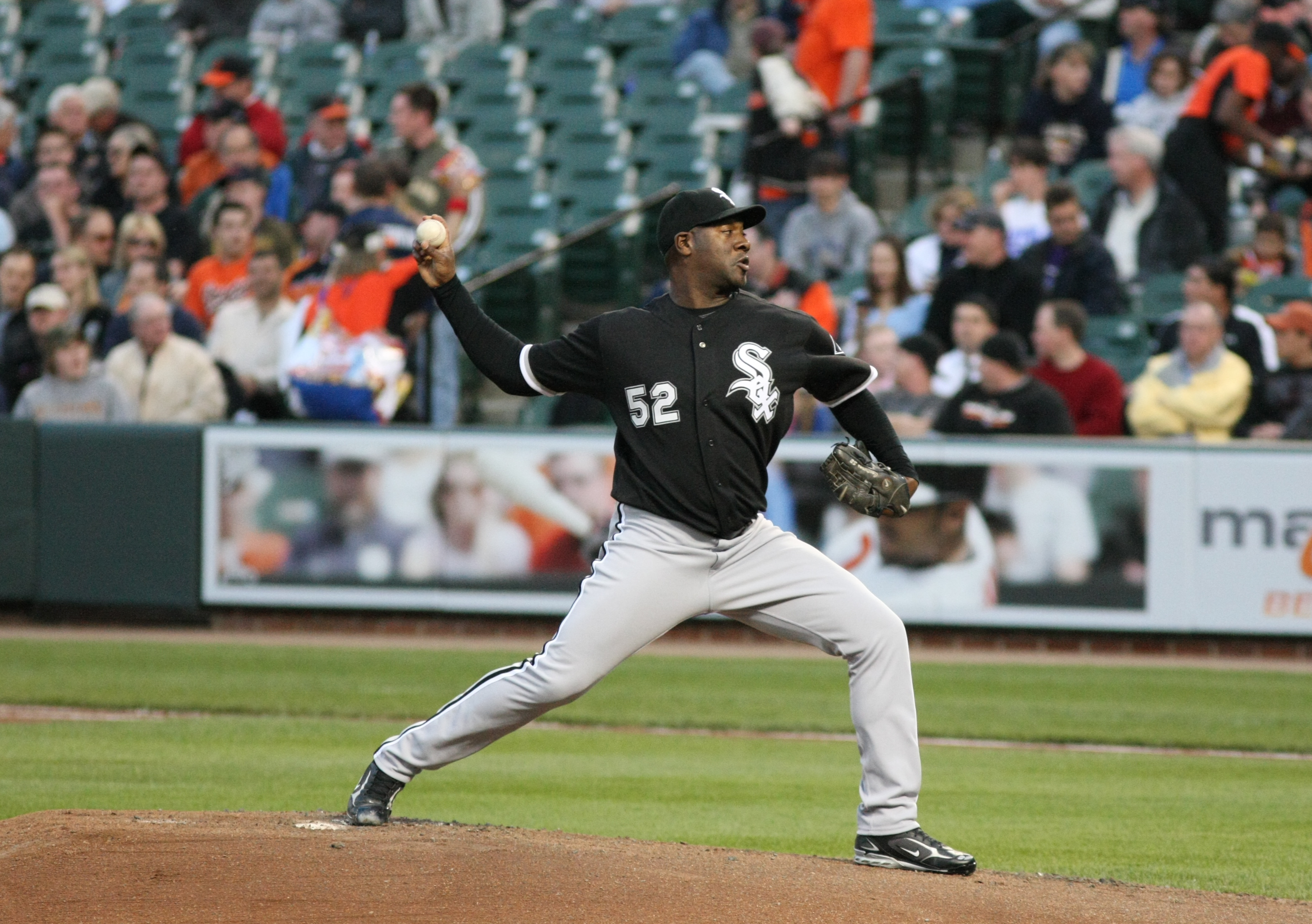 José Contreras